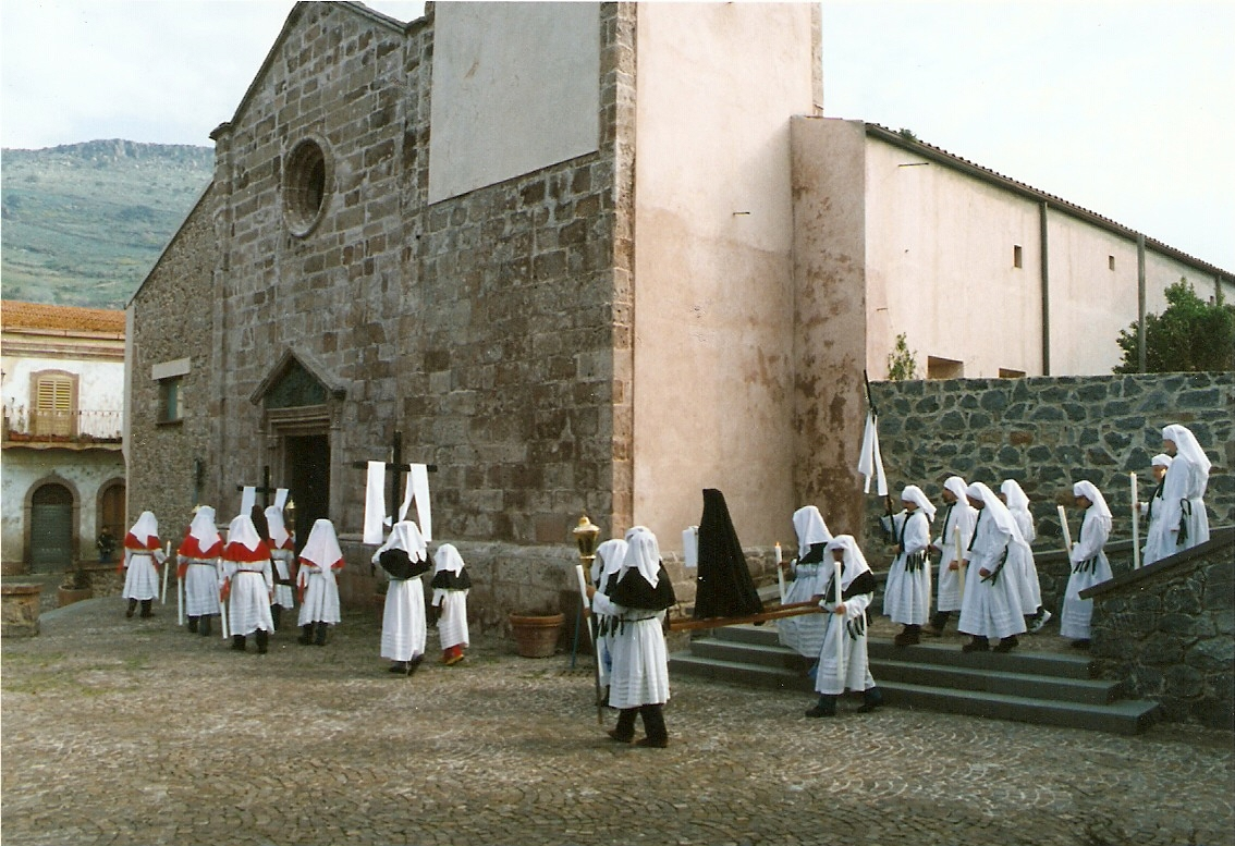 Bortigali (Sardegna). Le tre Confraternite durante la processione di "Sas Chircas" (venerdì santo). Sullo sfondo: la facciata della Chiesa Parrocchiale.